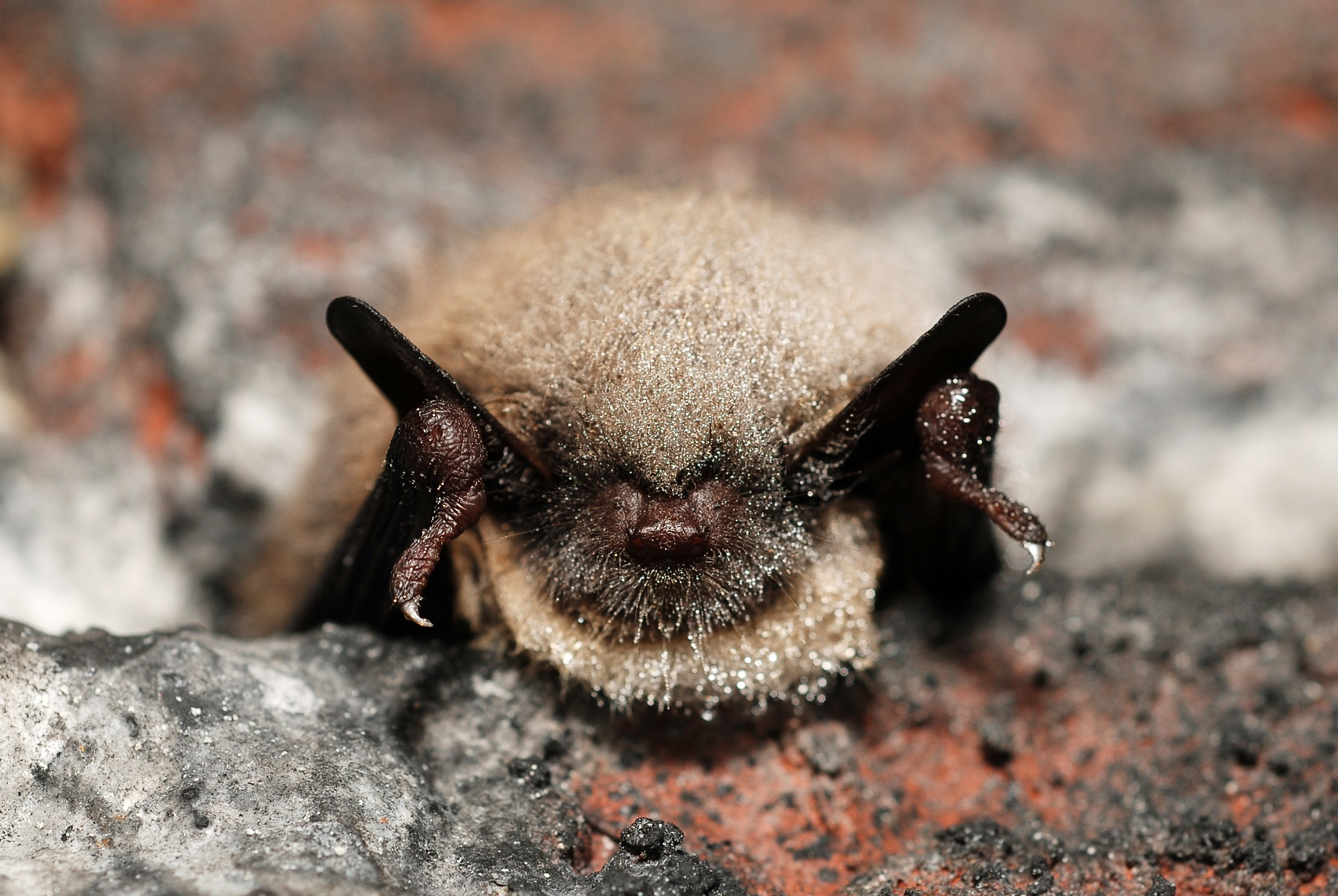 Myotis mystacinus sl